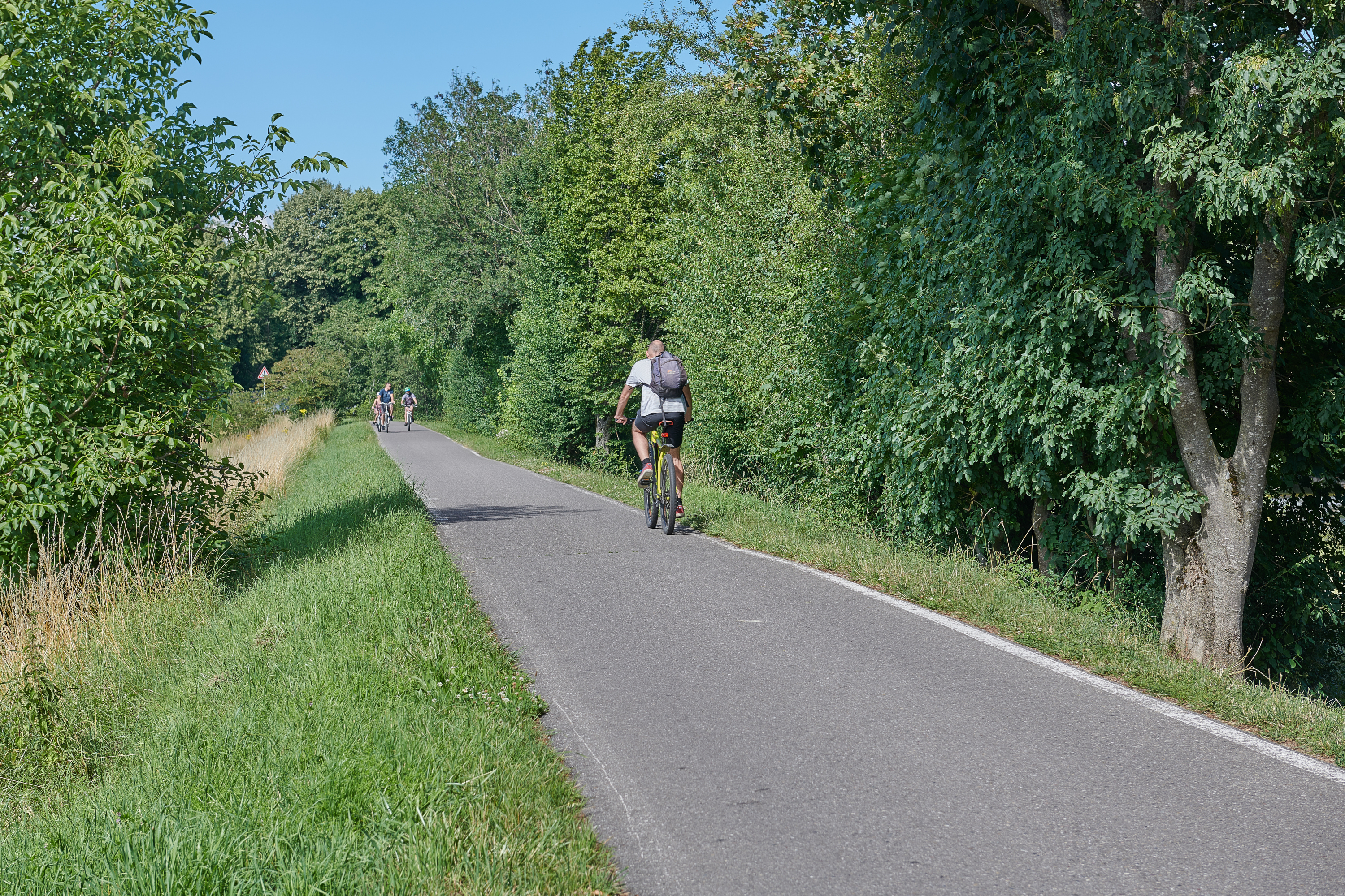 Lörrach: Wiesentalradweg